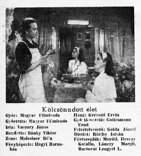 Híradás a Kölcsönadott élet c. filmről a Magyar Film c. lapban